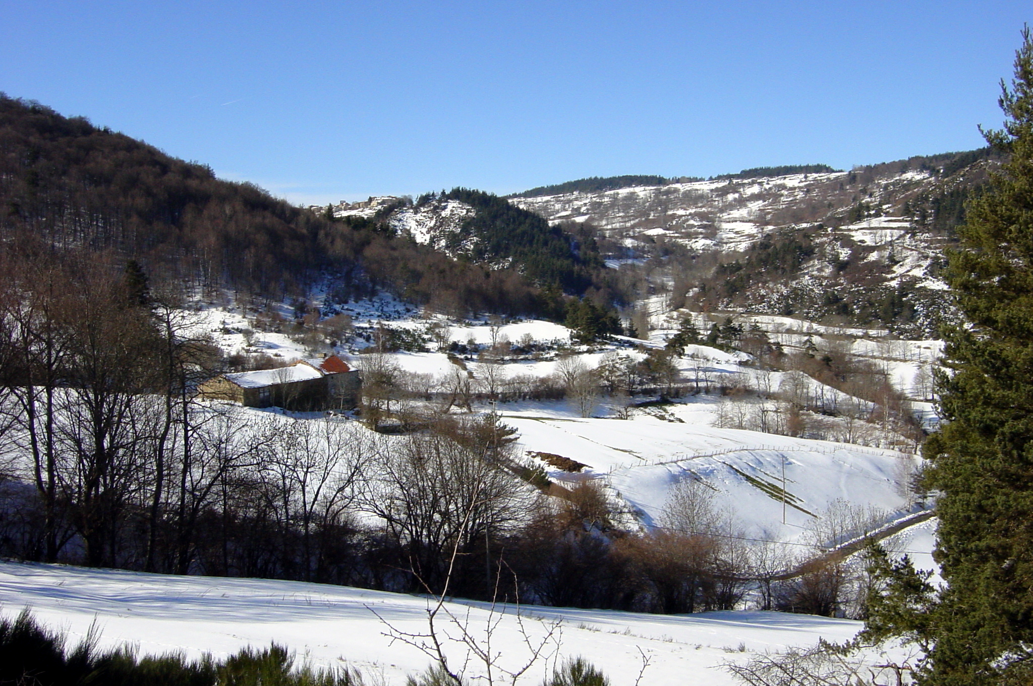 en Haute-Loire, Village de Croisances sous la neige